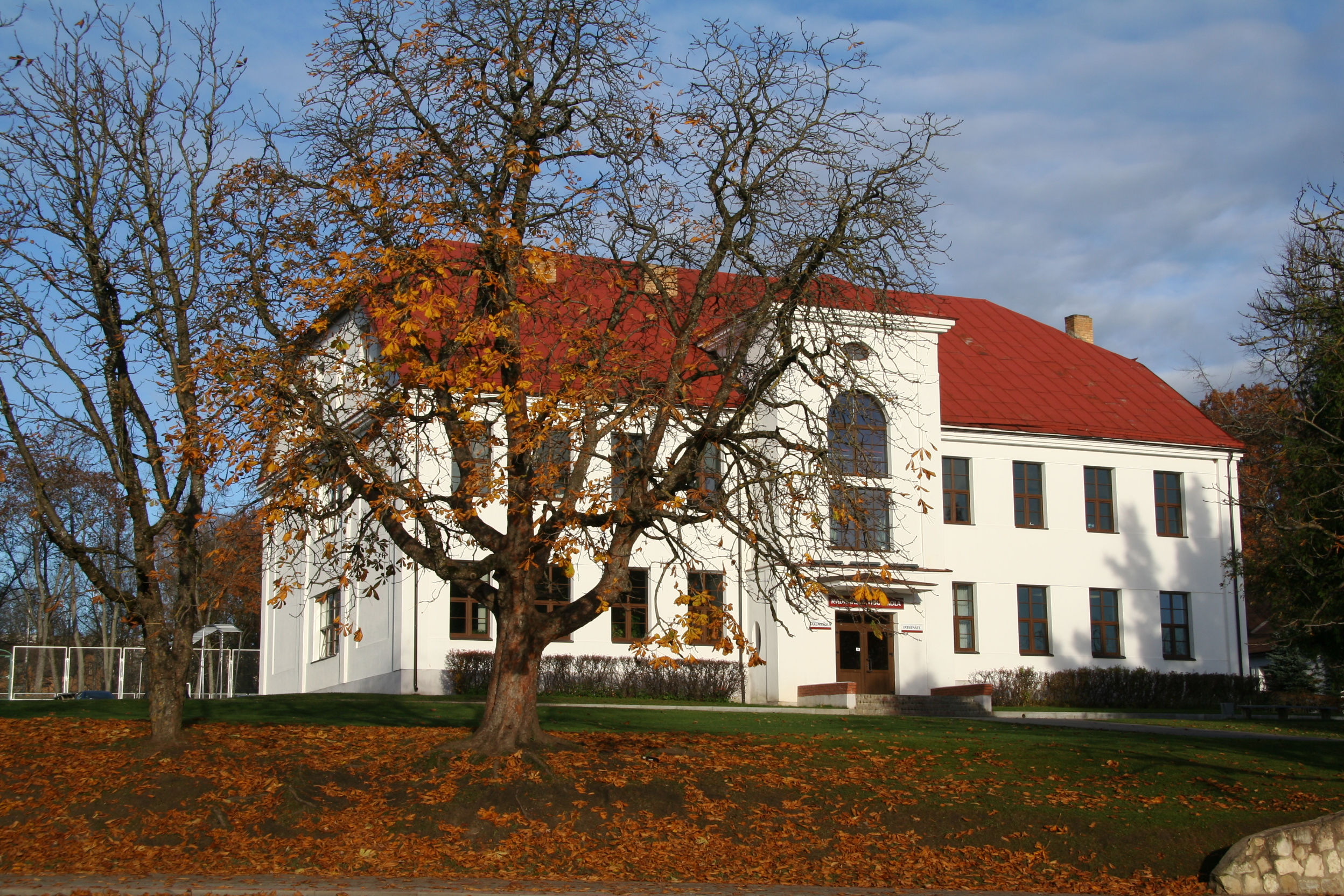 Madonas pilsētas 2. vidusskola, Skolas iela 10